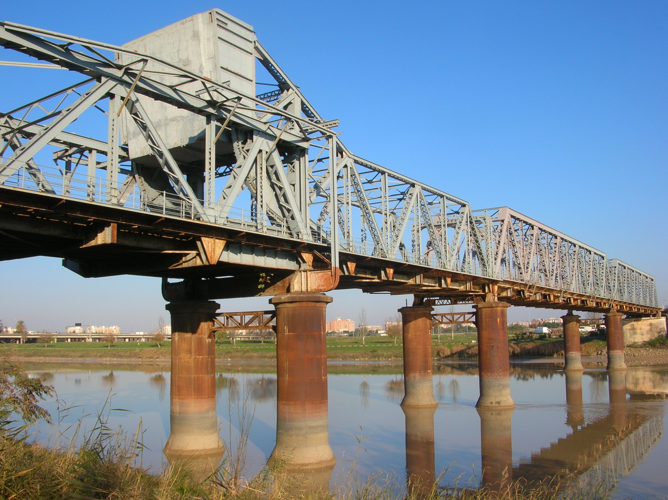 Pont de San Juan sur le Guadalquivir, entre Séville et San Juan de Aznalfarache